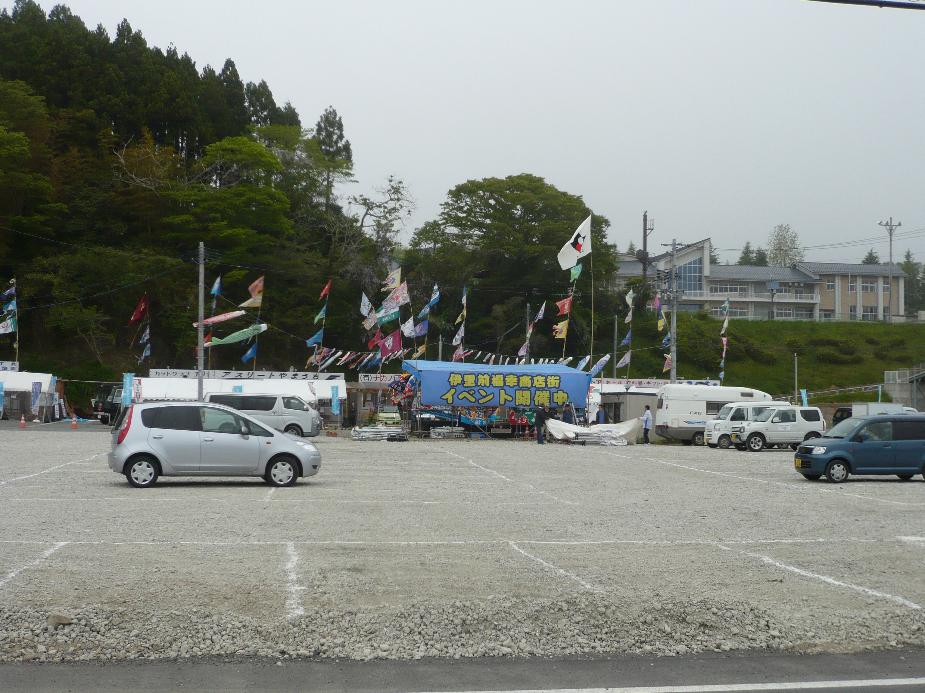 伊里前福幸商店街。奥の校舎は伊里前小学校(2013年6月1日）